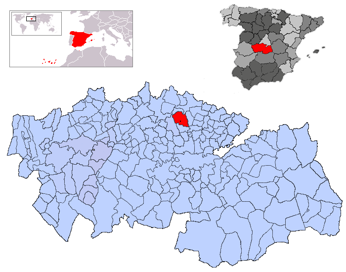 Camarena en la provincia de Toledo